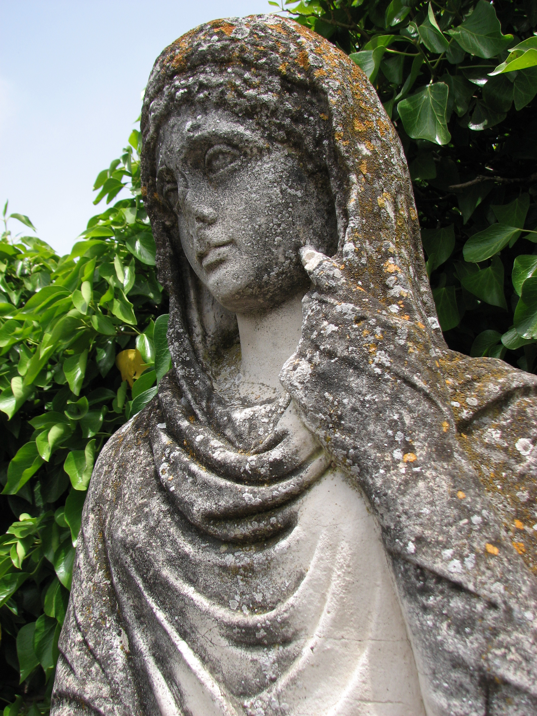 Ostia Antica, Roma, ItaliaIMG_1313 Ostia Antica